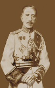 King Faisal 1